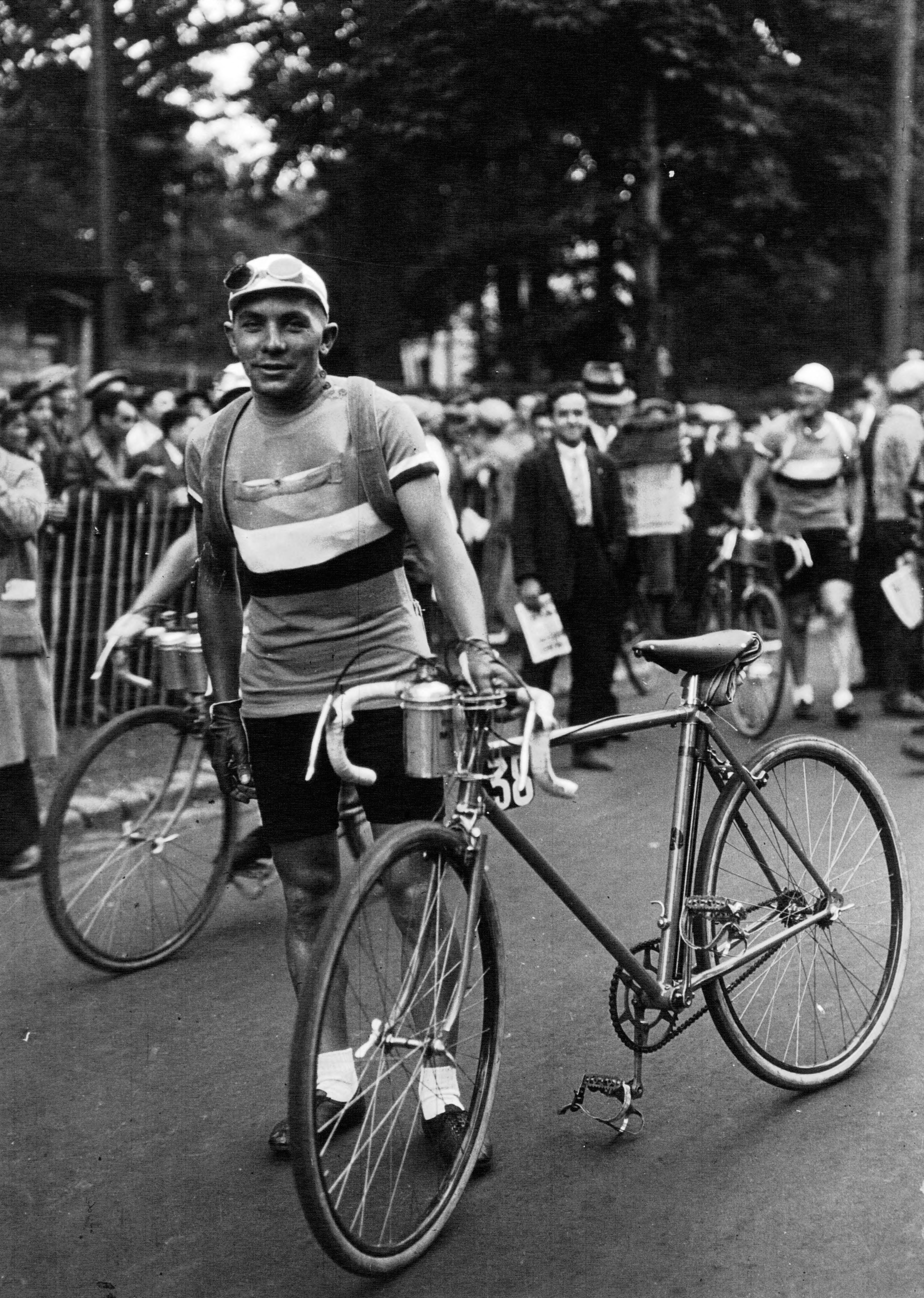 Maurice Archambaud lors du Tour de France 1932